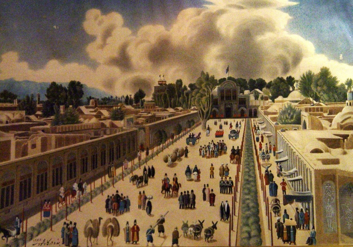 دورنمای خیابان الماسیه و سر در باب همایون (دالان بهشت) از سمت توپخانه